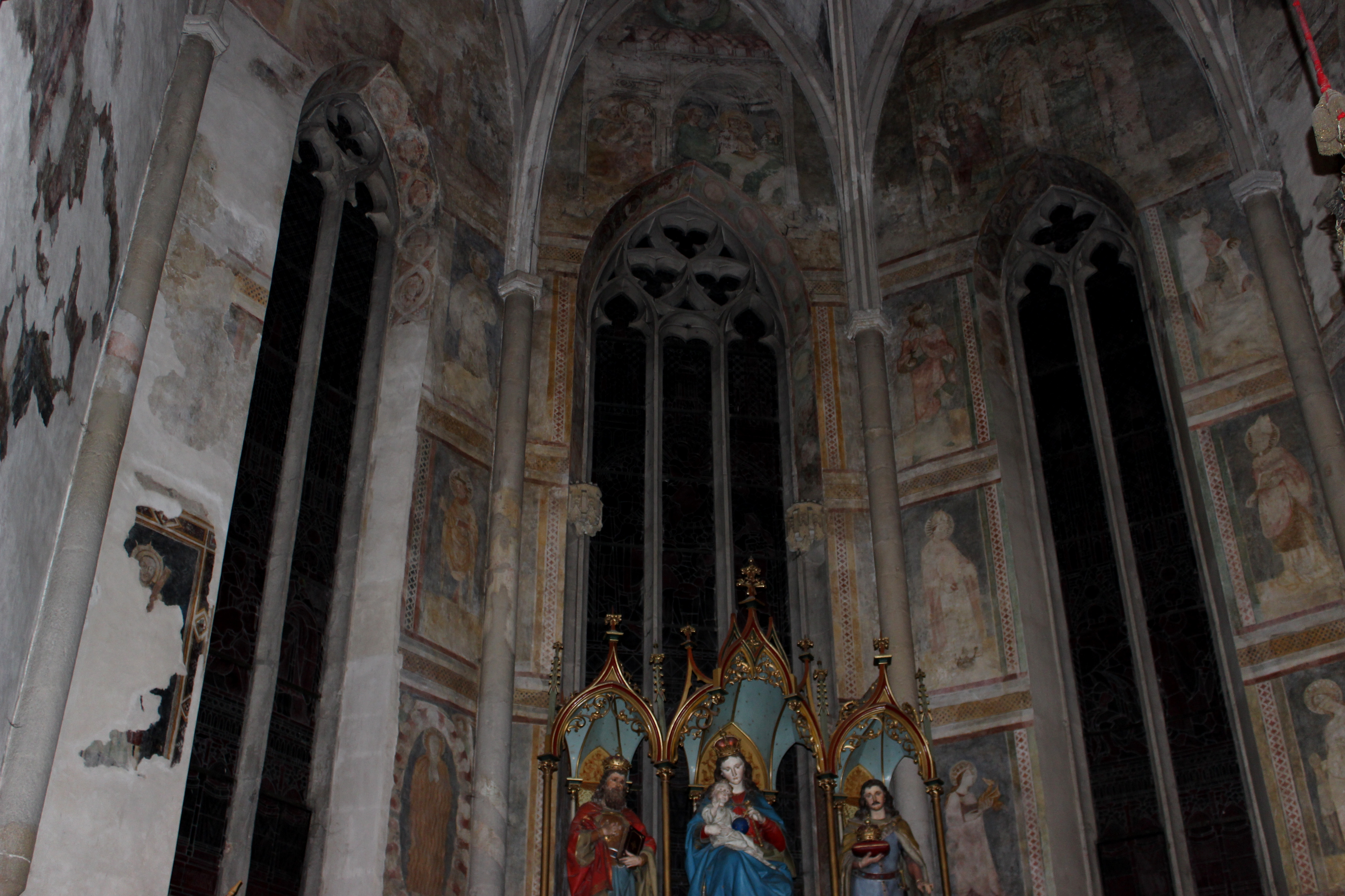 Keszthelyi ferences templom - részlet